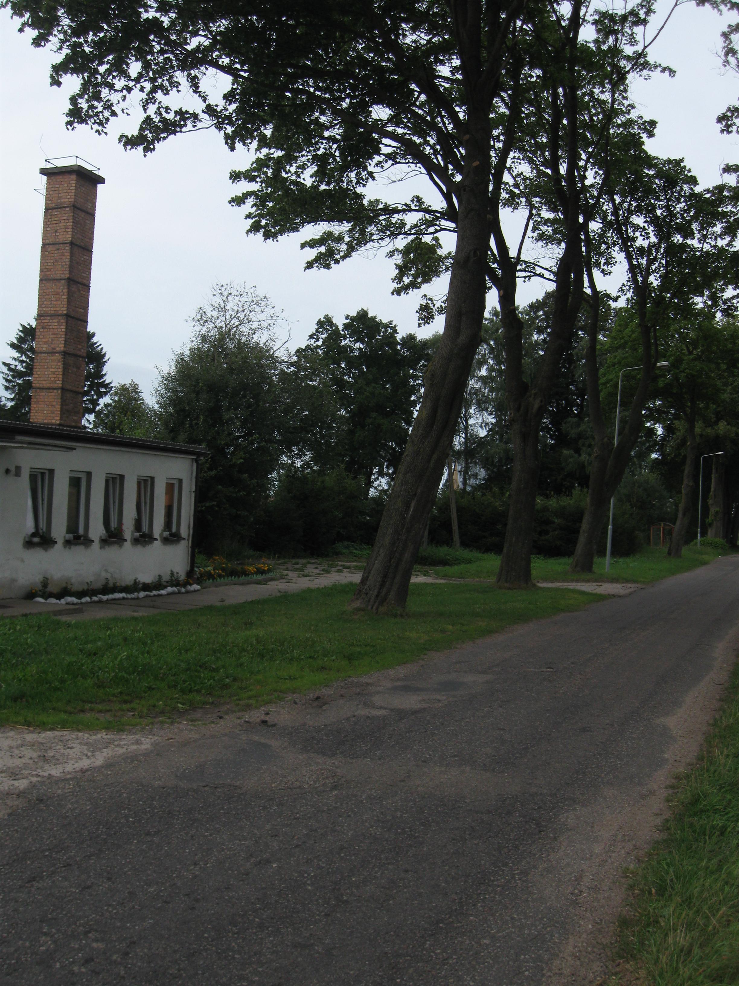 Mechowo - centrum